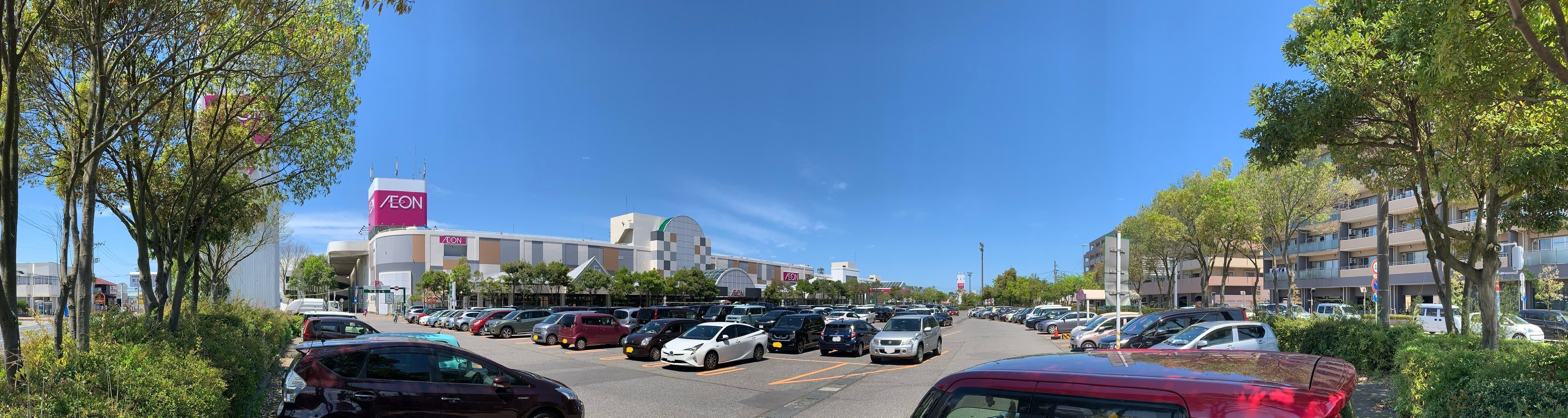 イオン新潟東店（2020年5月）旧・ジャスコ新潟東店